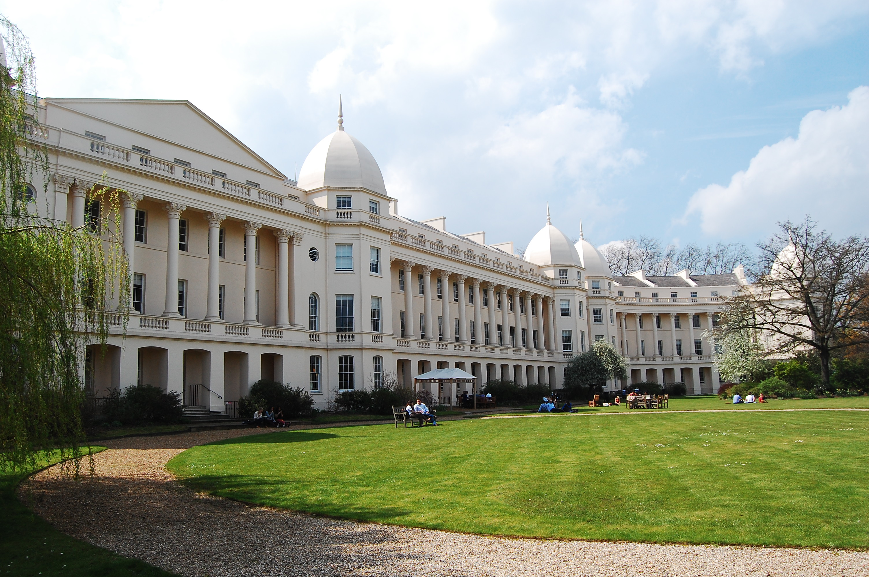 LBS campus 2